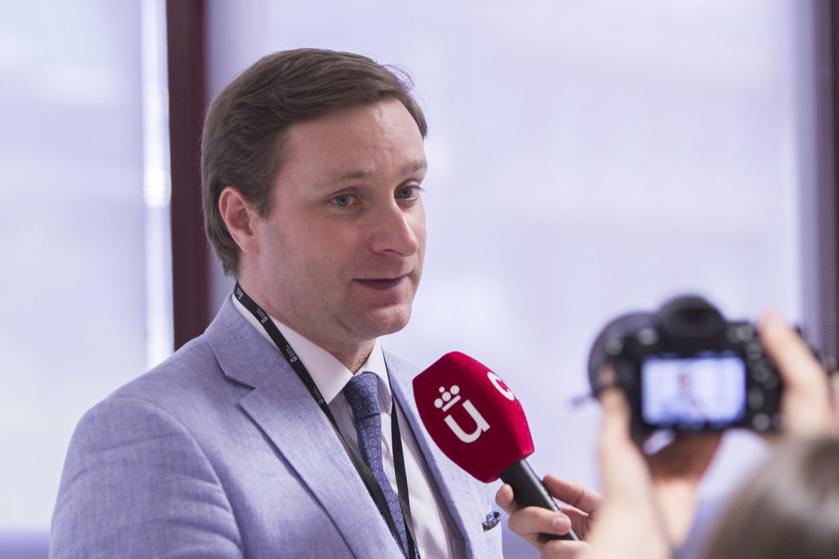 Alexander Moutchnik